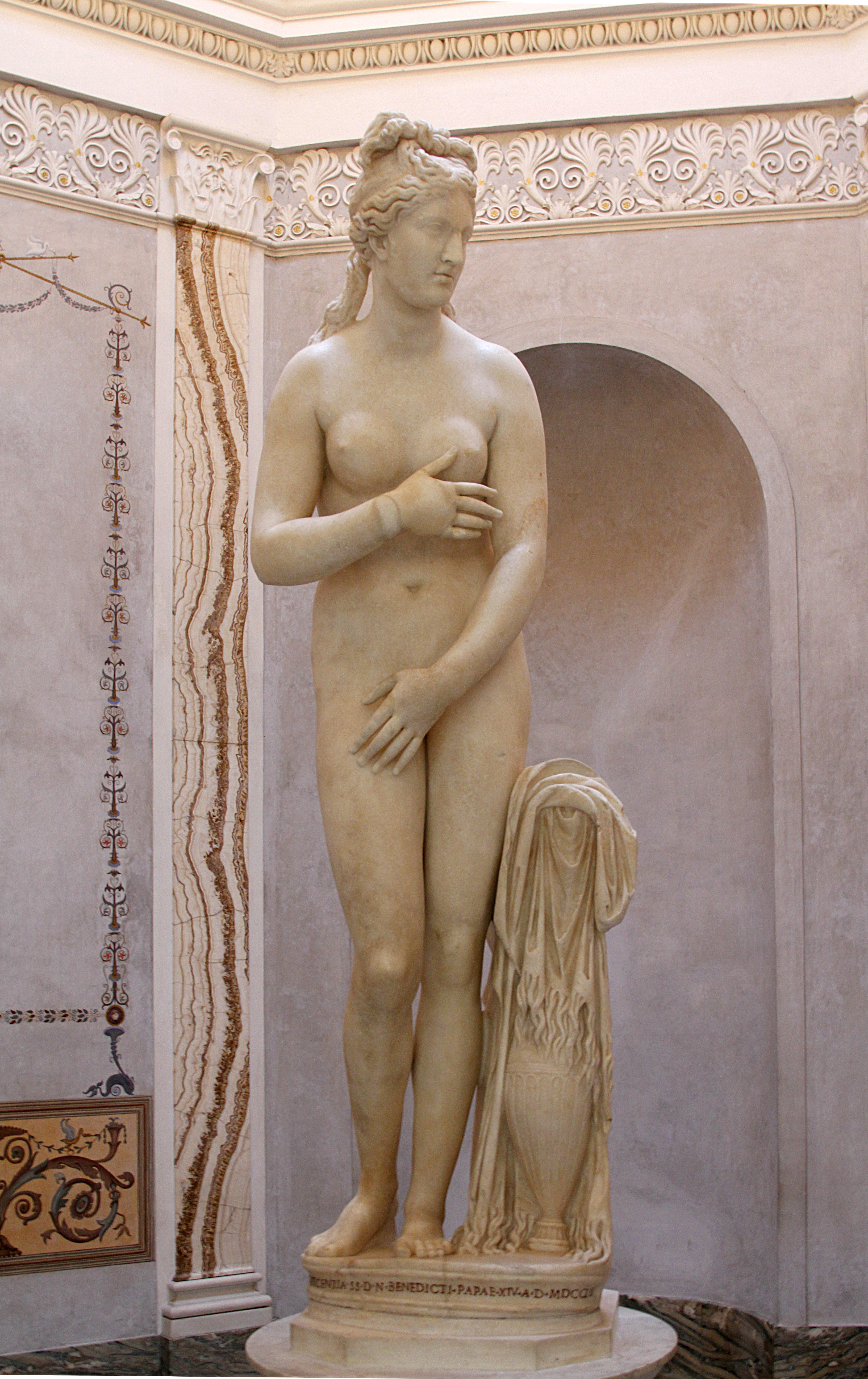 Palazzo Nuovo - Musei Capitolini - Rome